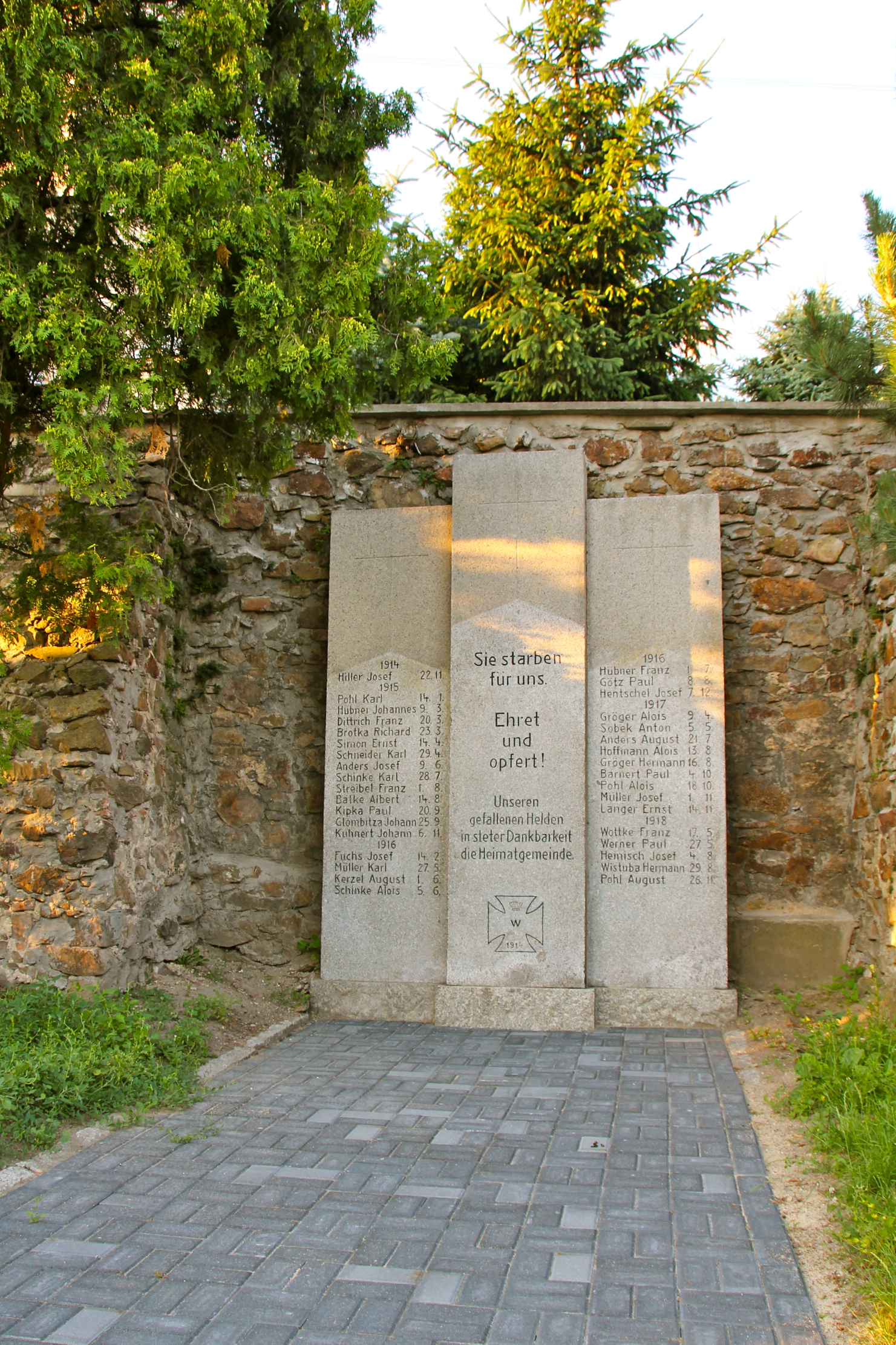 Dytmarów – wieś w Polsce położona w województwie opolskim, w powiecie prudnickim, w gminie Lubrza.